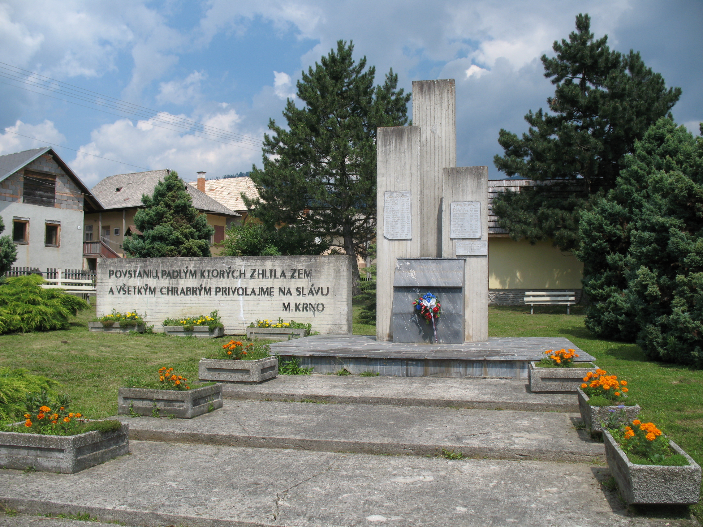 Oláhpatak